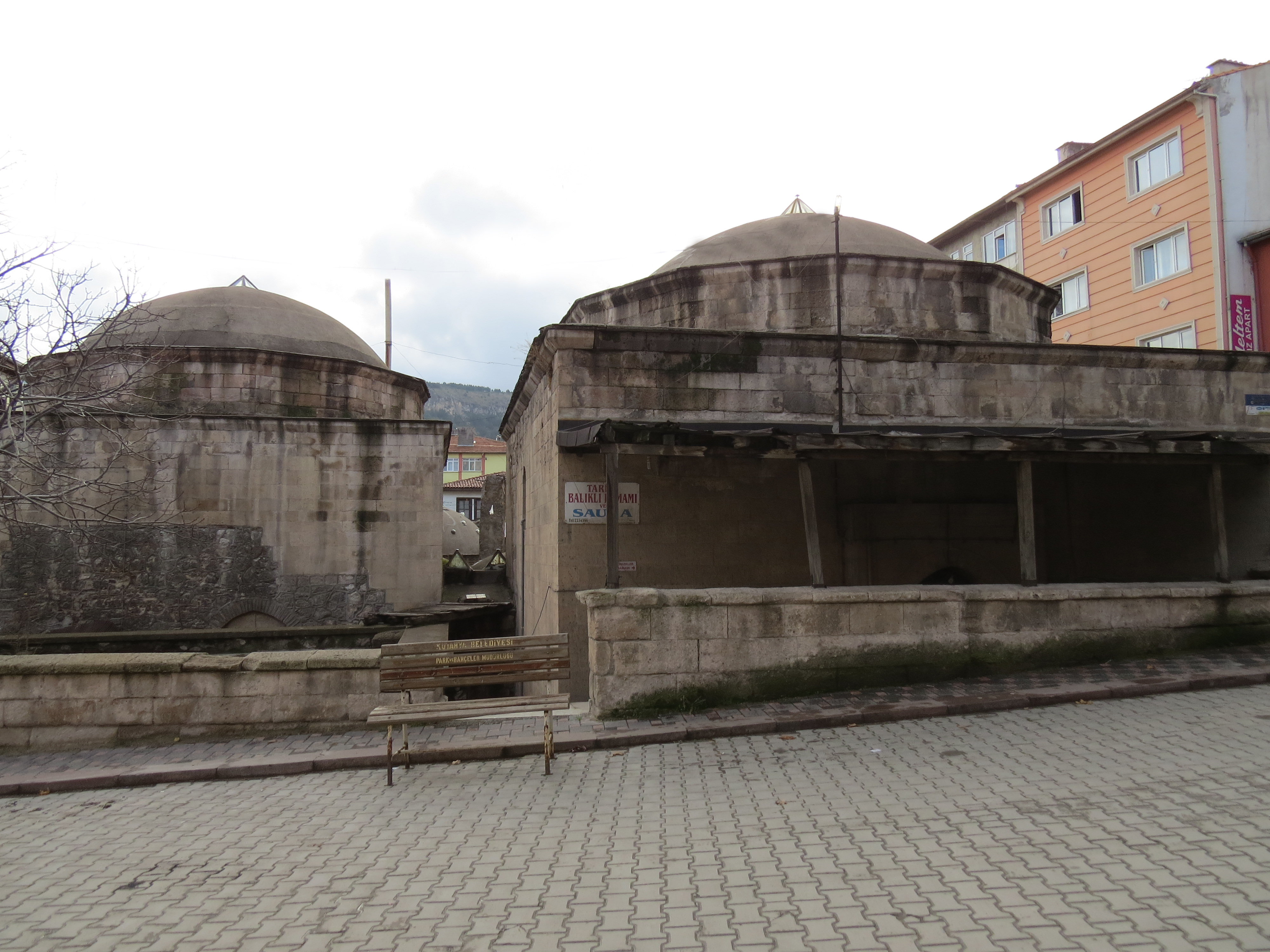 balıklı hamamı